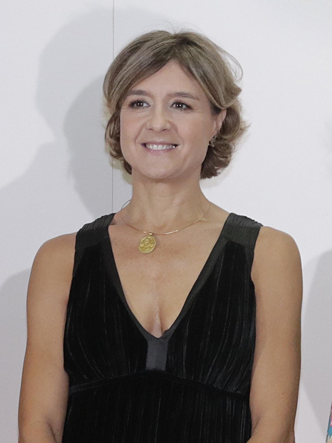 En los Premios Mariano de Cavia, Luca de Tena y Mingote 2016 de ABC, uno de los premios más prestigiosos de la prensa en España.